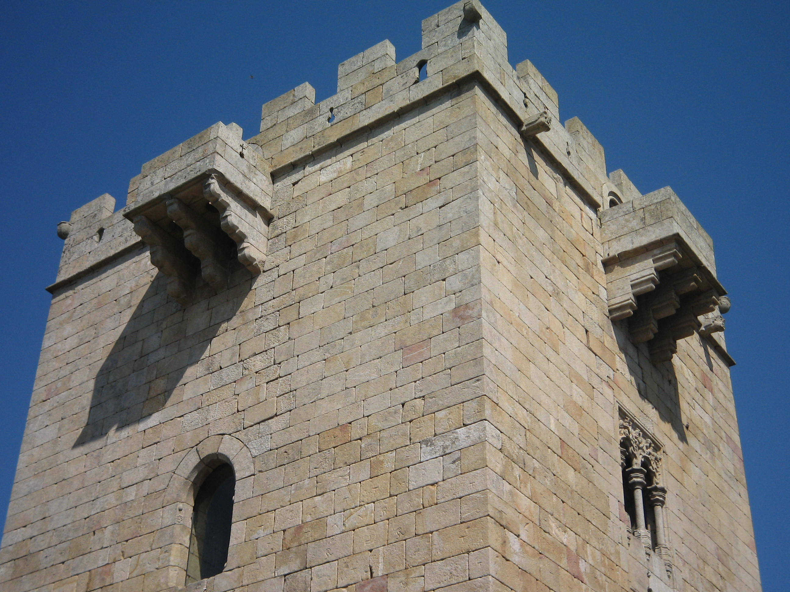 Pormenor da torre de menagem do Castelo de Pinhel. Com gárgulas salientes; balcões sustentados por misulas; janelas com arco quebrado. Distrito da Guarda.